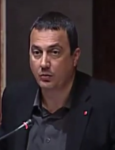 José Antonio Pujante Diekmann, 2014.